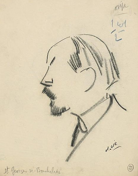 Saint-Georges de Bouhelier : dessin